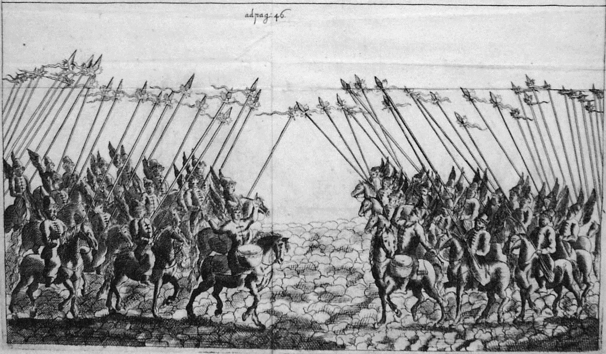 Крылатые всадники, высланные на встречу послам. Всем нетерпеливо хотелось видеть город, особенно царя и его местопребывание, а в это время уже доносились издали громкие звуки литавр, груб, рогов; потом представилось взорам блестящее войско, разделенное на 2 половины, справа и слева (послам приходилось проезжать серединой) в разноцветном одеянии, со множеством труб и литавр. Военачальники верхом на статных конях, на богатых персидских седлах представляли большое разнообразие одежд и убранства и красою и величественностью превосходили один другого. Подъехав к городу ближе, глядим — новый, невиданный дотоле отряд воинов! Цвет длинных красных одеяний был на всех одинаков, сидели они верхом на белых конях, а к плечам у них были прилажены крылья, поднимавшиеся над головой и красиво расписанные; в руках — длинные пики, к концу коих было приделано золотое изображение крылатого дракона, вертевшееся по ветру. Отряд казался ангельским легионом. Кто не подивился бы на такое чудное зрелище, того по справедливости я счел бы слепым и среди цветущего сада, полного всякого рода цветов.